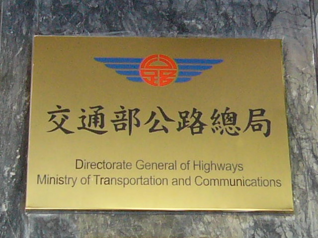 臺北市中正區忠孝西路一段，交通部公路總局大門銘板。